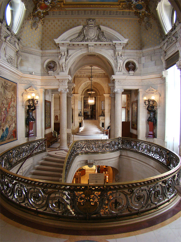 Château de Chantilly, Oise, Picardie, France. Le vestibule d'honneur.